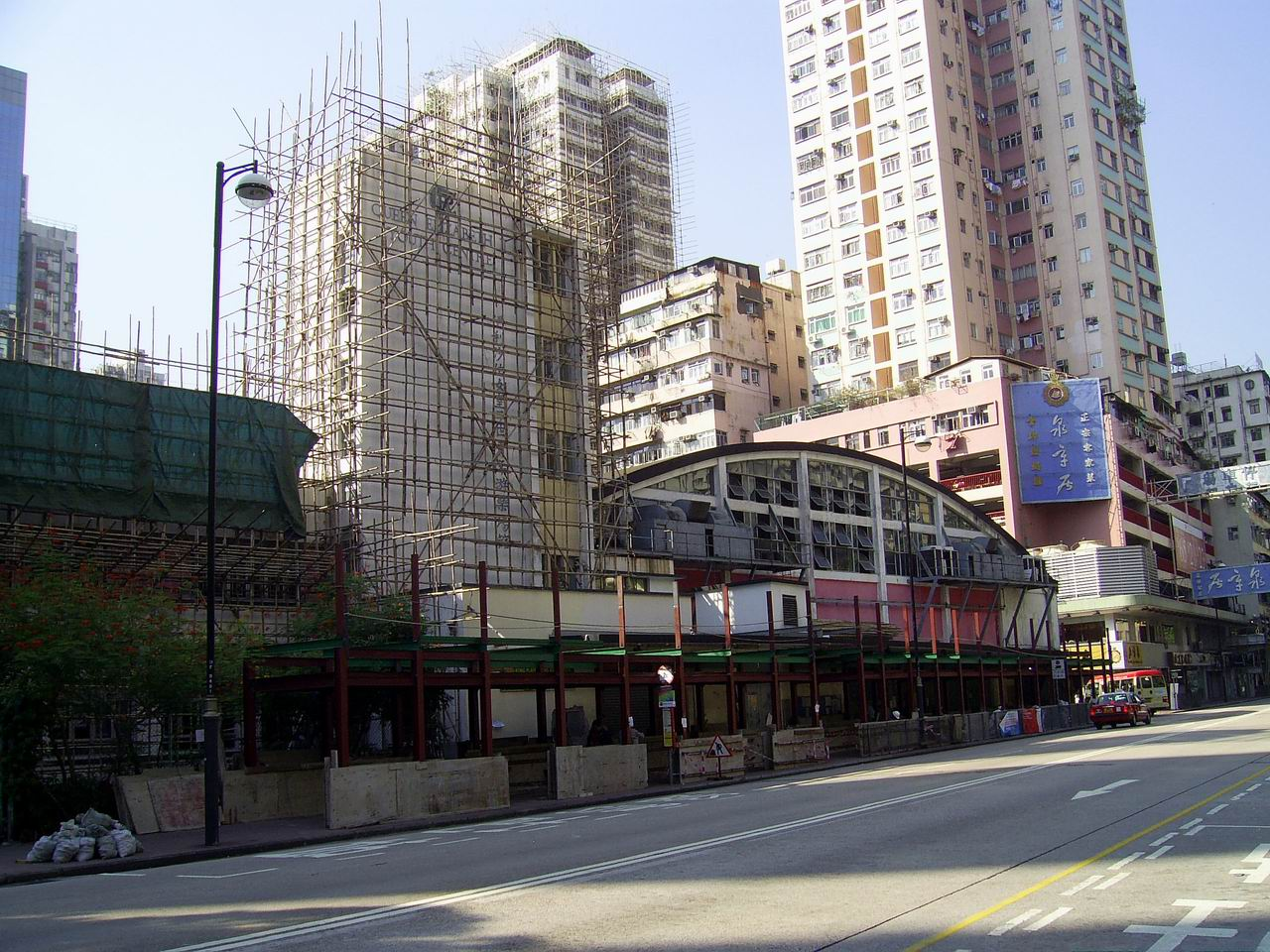 中文（香港）: 待拆的麥花臣室內場館